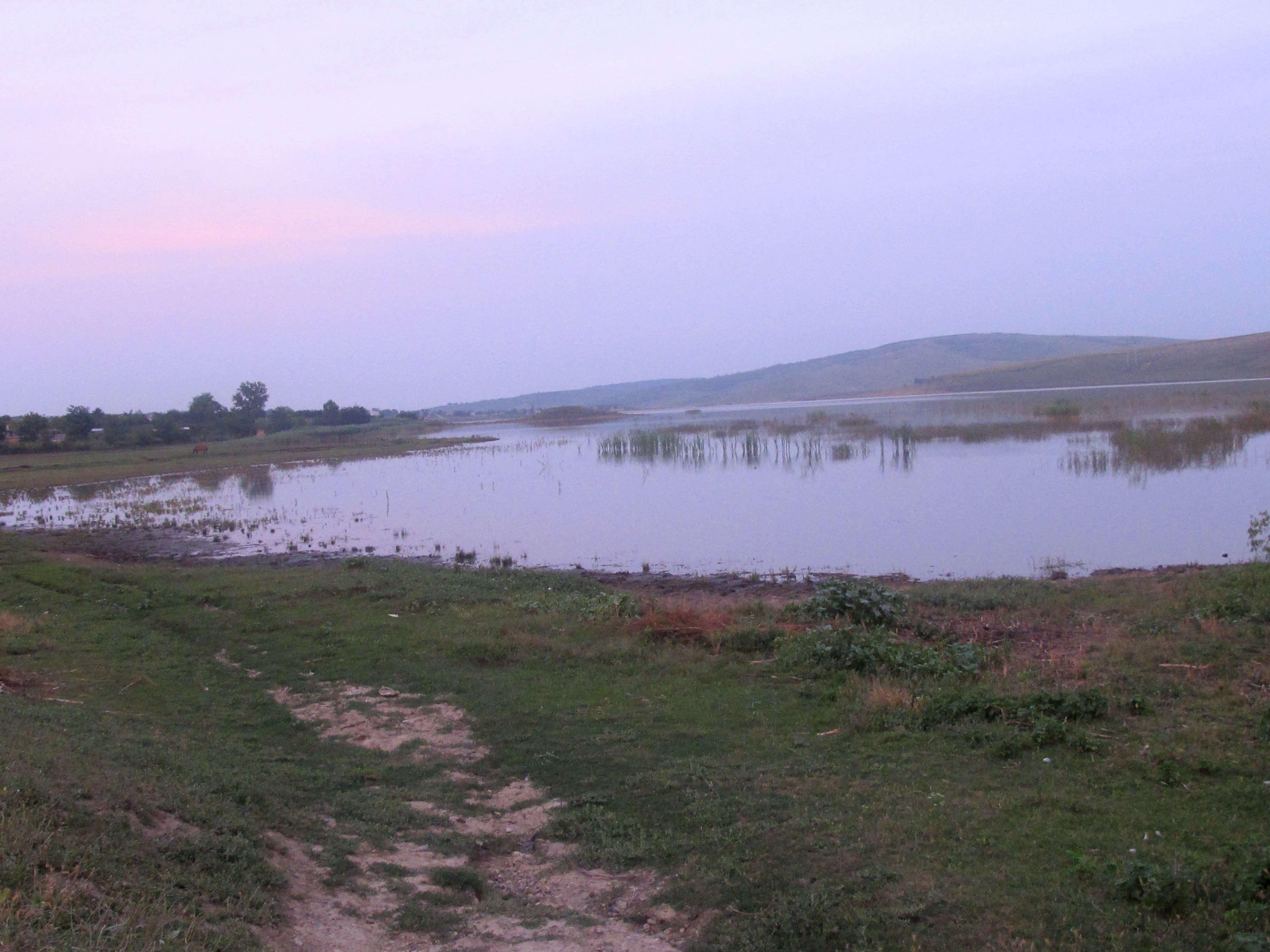 Lac în Iezărenii Vechi, raionul Sângerei